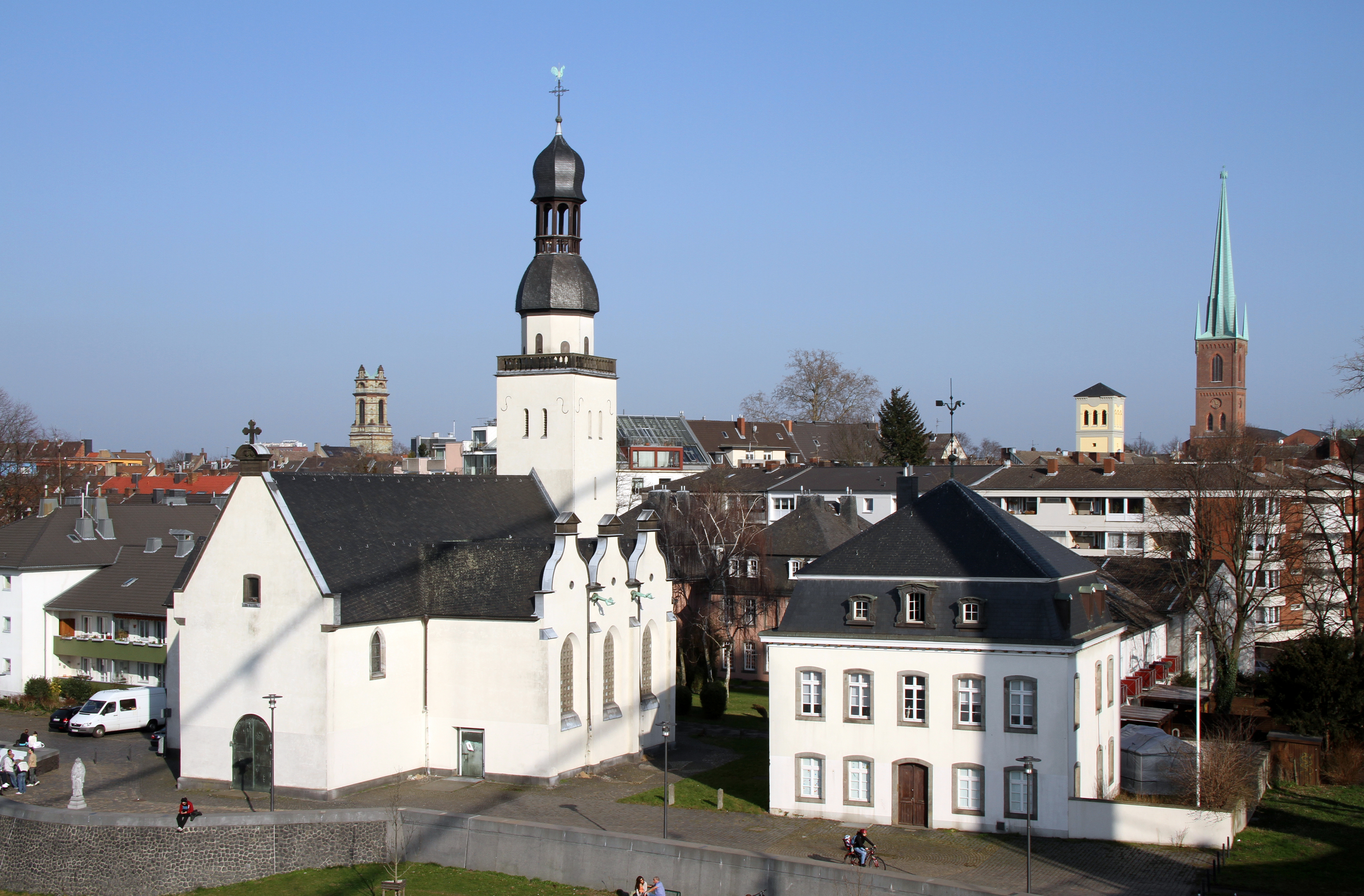 Köln-Mülheim, Sankt Clemens